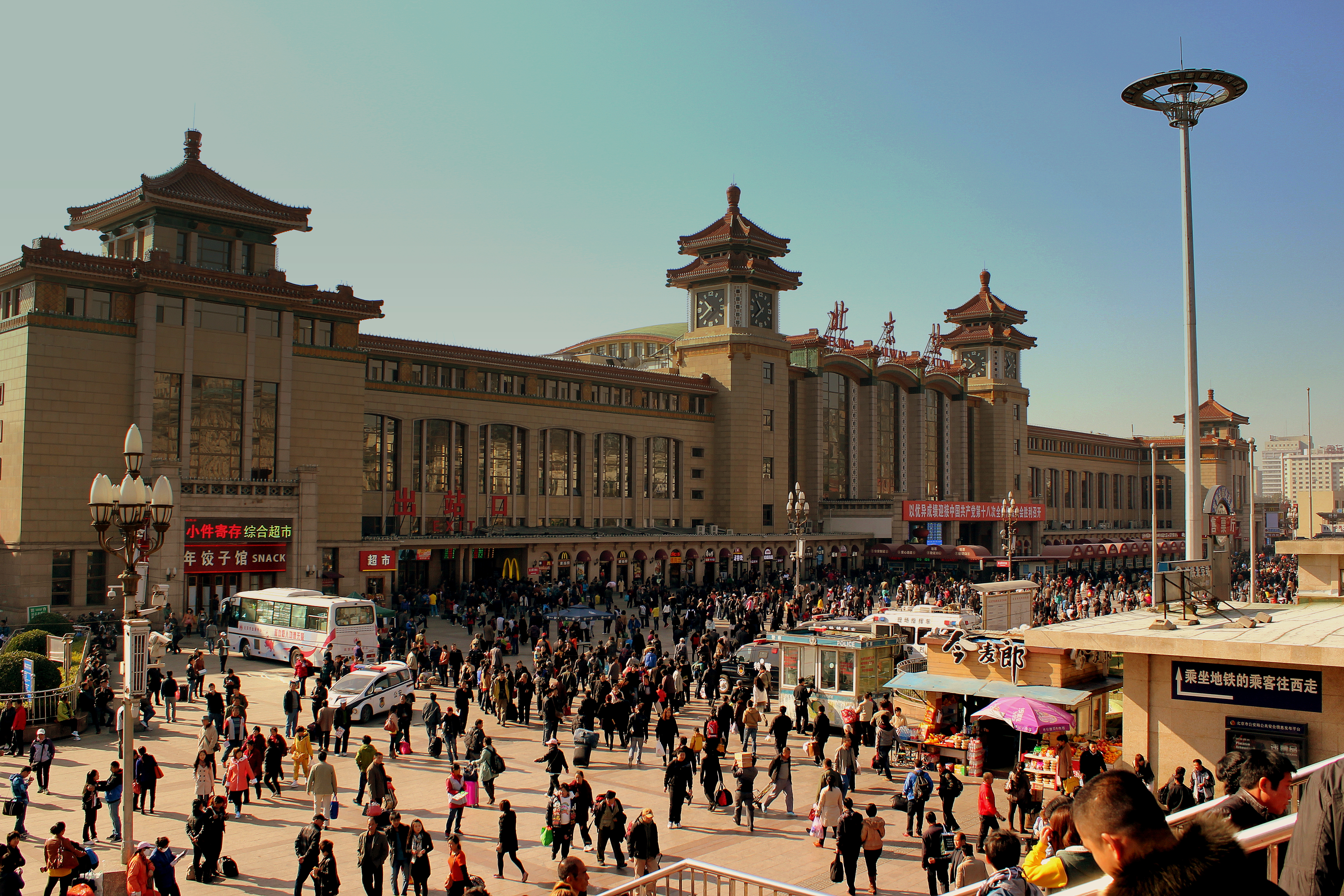 BEIJING RAILWAY STATION BEJING CHINA OCT 2012